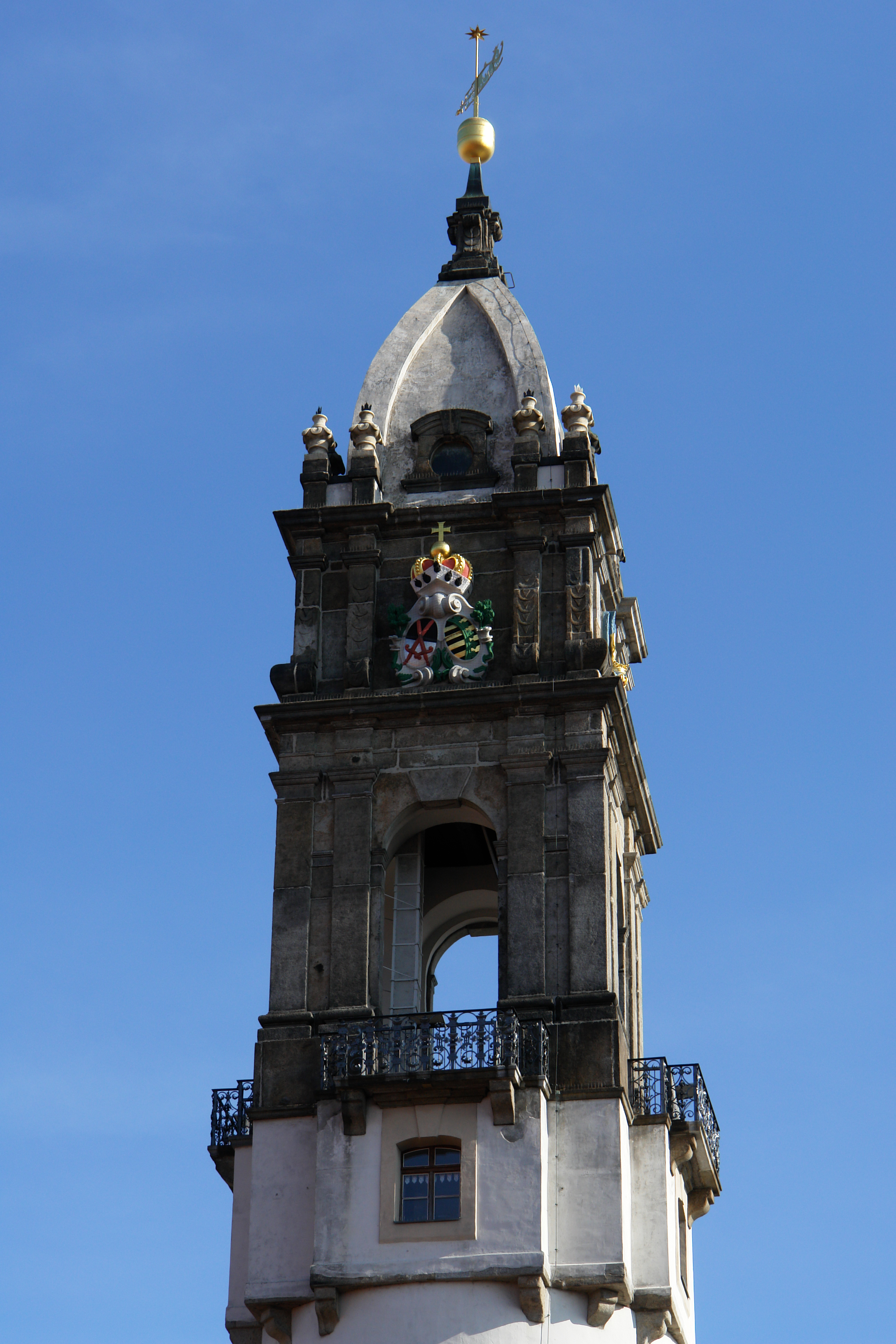 Reichenturm in Bautzen. Hornjoserbsce: Bohata wěža w Budyšinje.